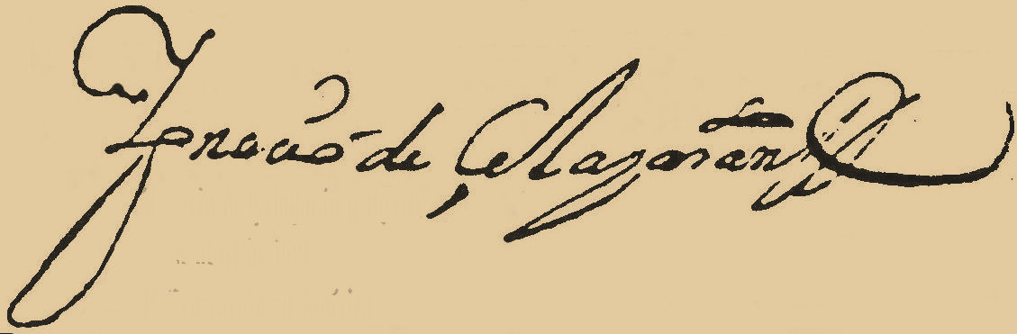 Fotografía de la firma del capitán Ygnacio de Çelayarán y Ugarte en 1681.